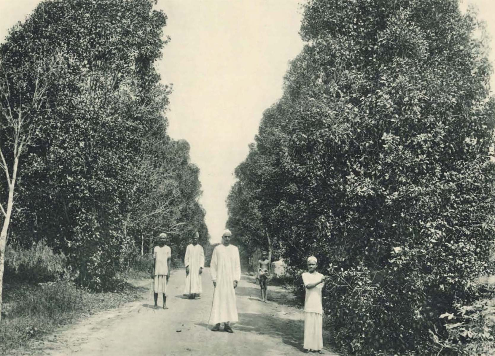 Gewürznelkenbäume (Caryophyllus aromaticus L.) auf Zanzibar